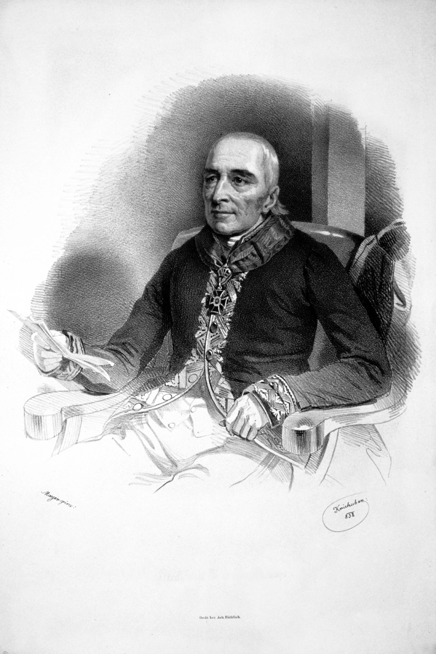 Ferdinand Freiherr von Fechtig (1756-1837), Kärntner Landstand, Ehrenbürger von Wien.